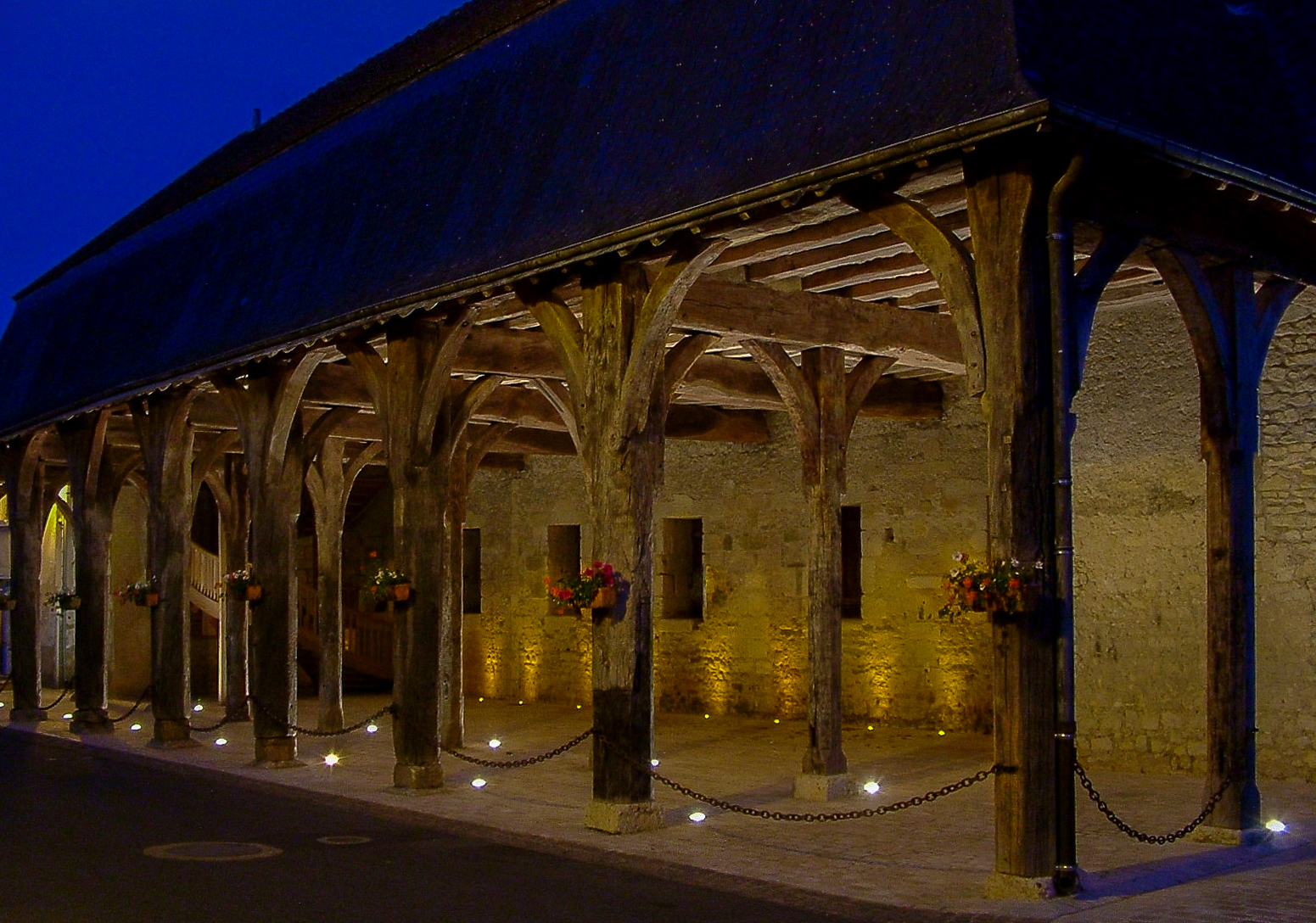 La Halle aux laines de Montrésor, vue nocturne